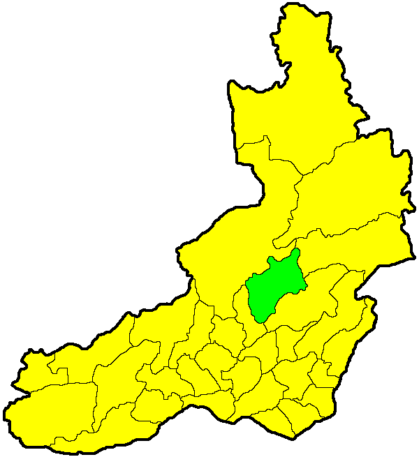 Чернышевский район на карте Забайкальского края